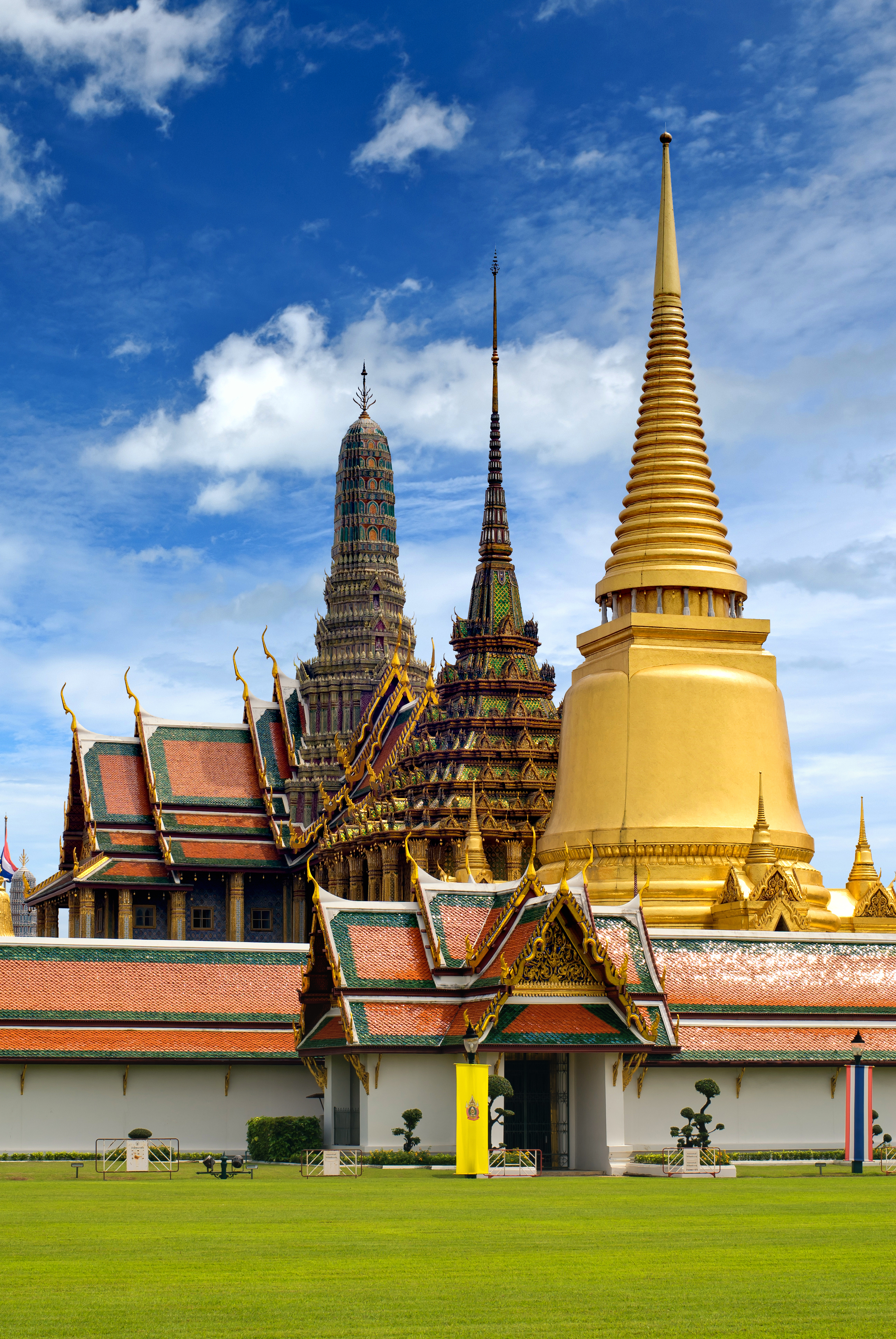 วัดพระศรีรัตนศาสดาราม